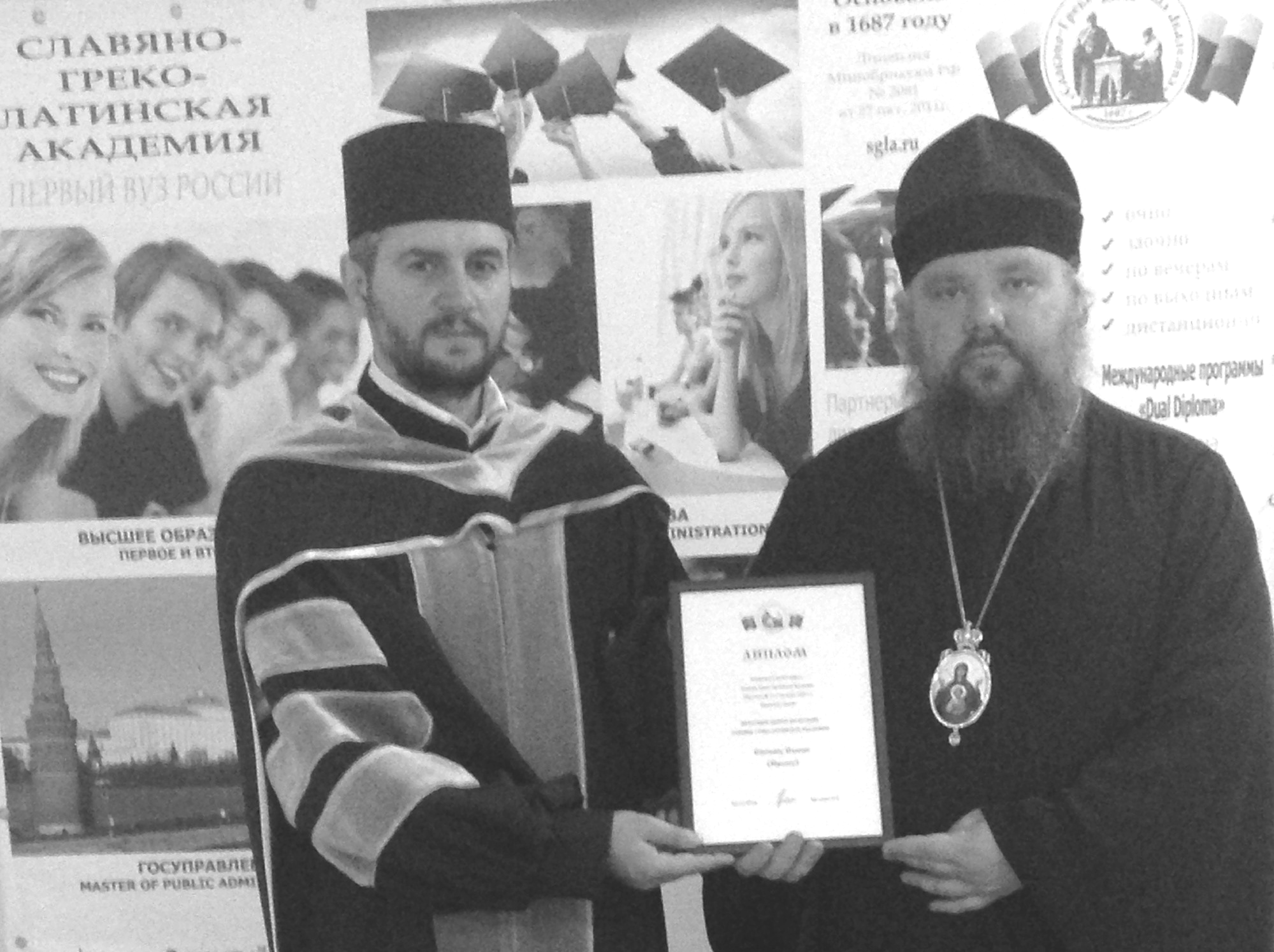 Присвоение степени Почетного доктора богословия Славяно-Греко-Латинской Академии